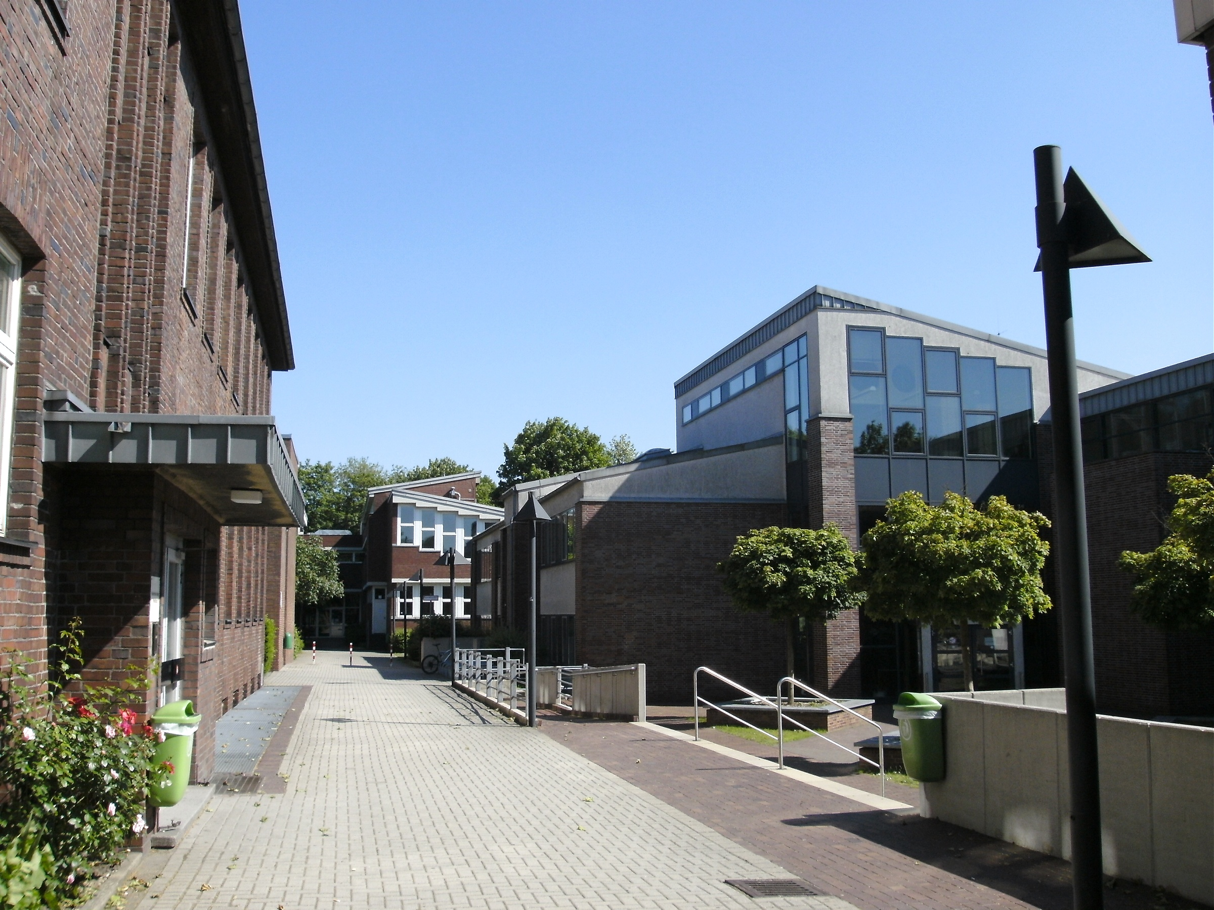 Niederrhein-Kolleg Oberhausen (Staatliches Weiterbildungskolleg)